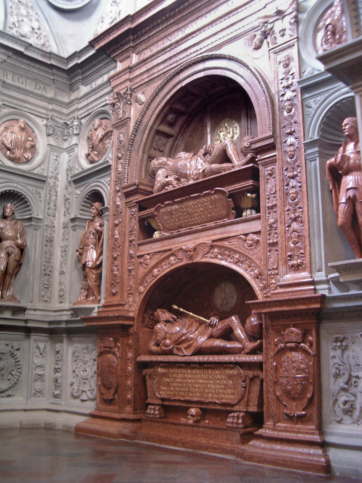 Nagrobek Zygmunta I Starego i Zygmunta II Augusta w Kaplicy Zygmuntowskiej Królewskiej Katedry na Wawelu